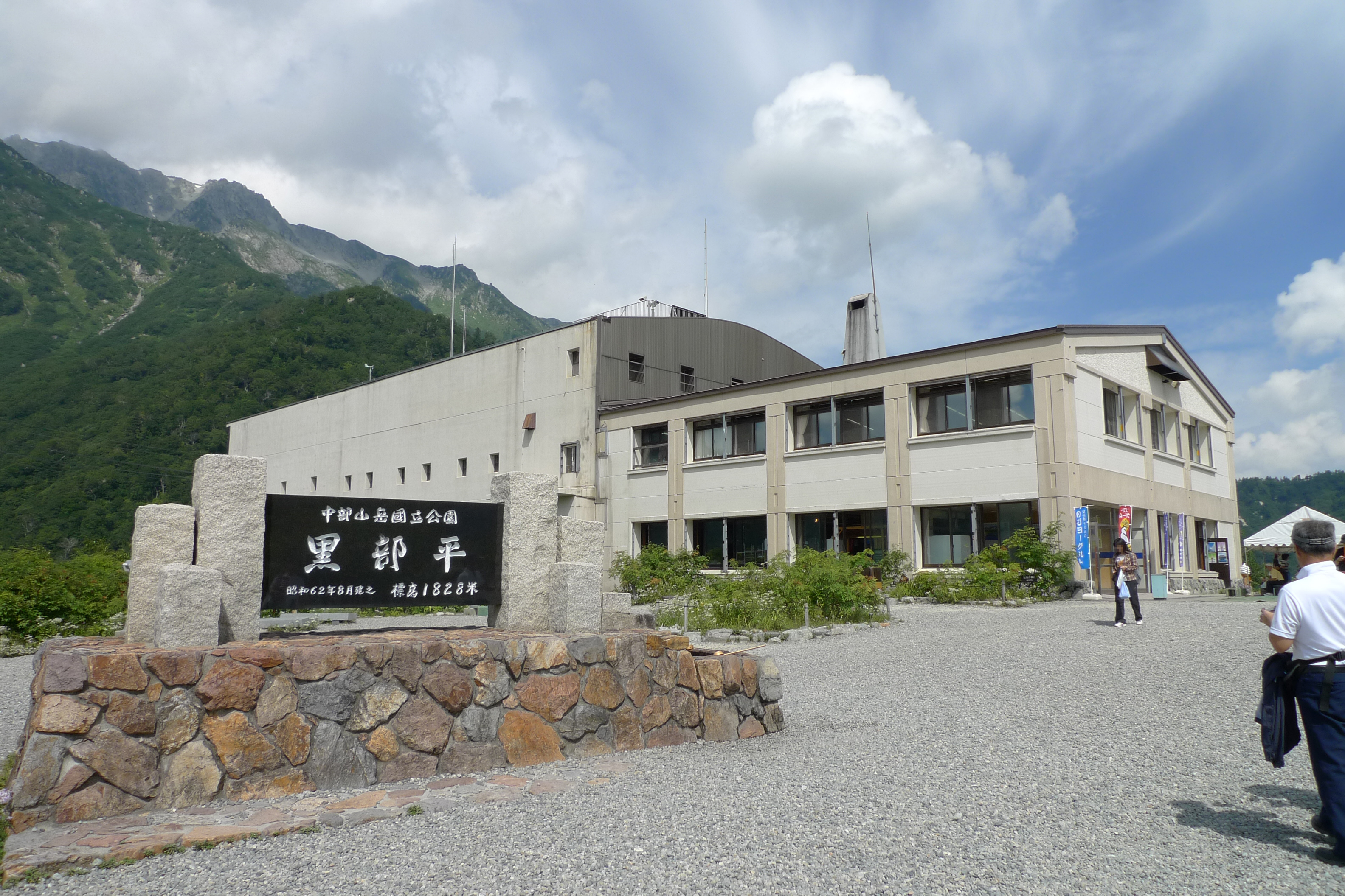 黒部ケーブルカー＆立山ロープウェイ・黒部平駅